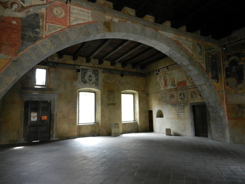 Bergamo - Affreschi del secolo XIII nell'Aula Picta del Palazzo della Curia Vescovile